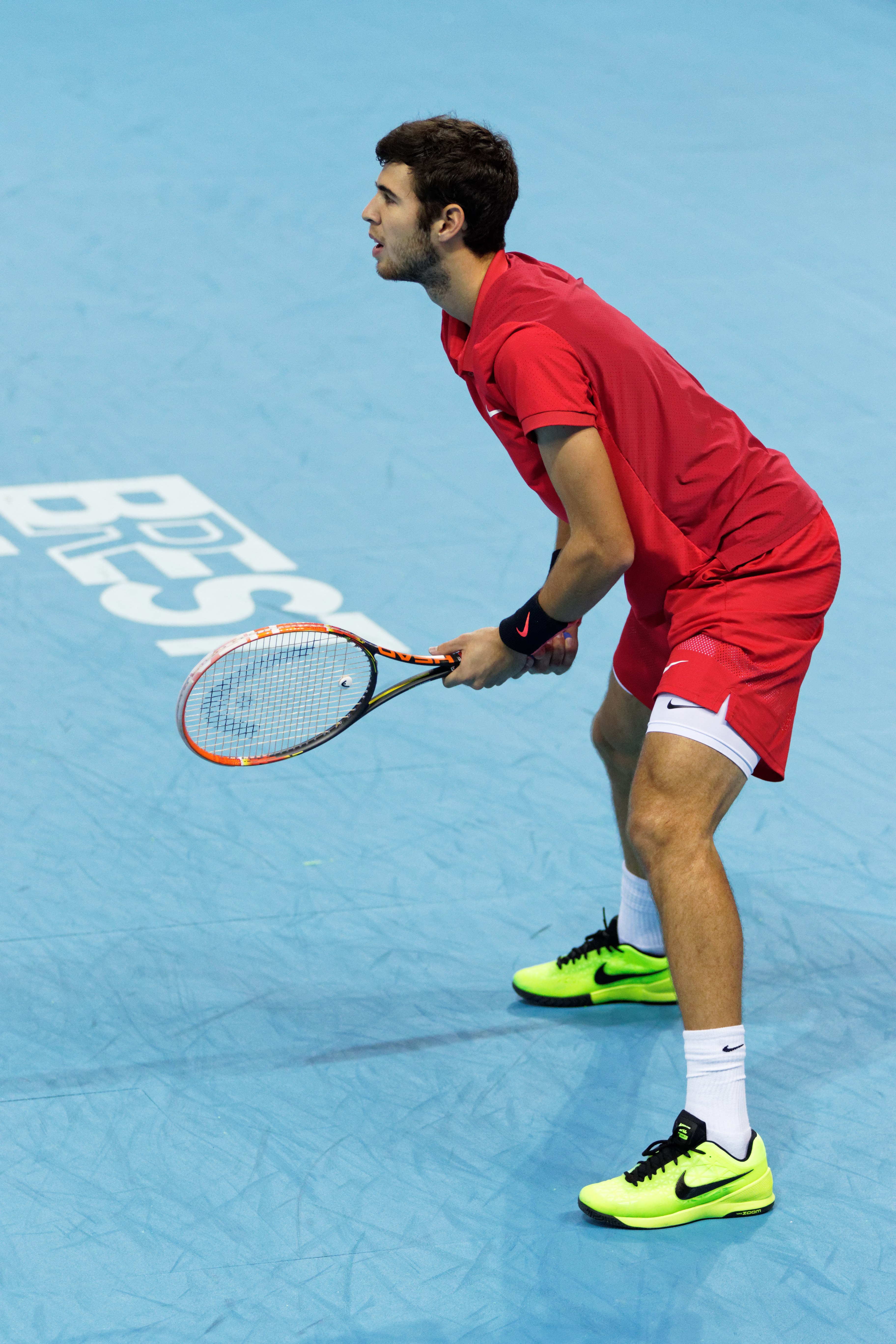 Rencontre entre Calvin Hemery et Karen Khachanov lors du huitième de final de l'Open de Brest Arena 2015. Karen Khachanov gagnera deux sets à un.